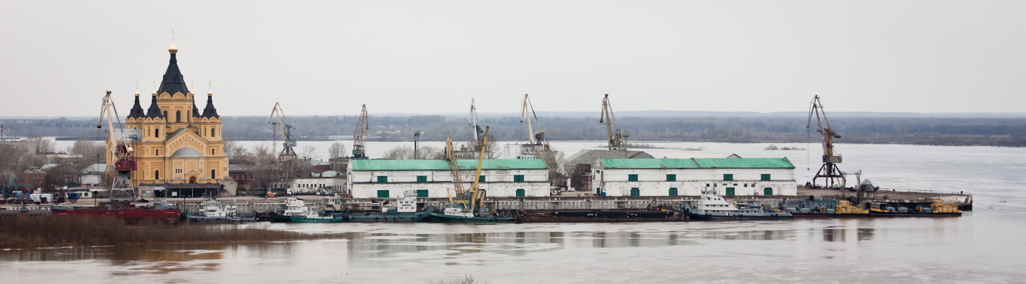 Стрелка (2012.04.21)